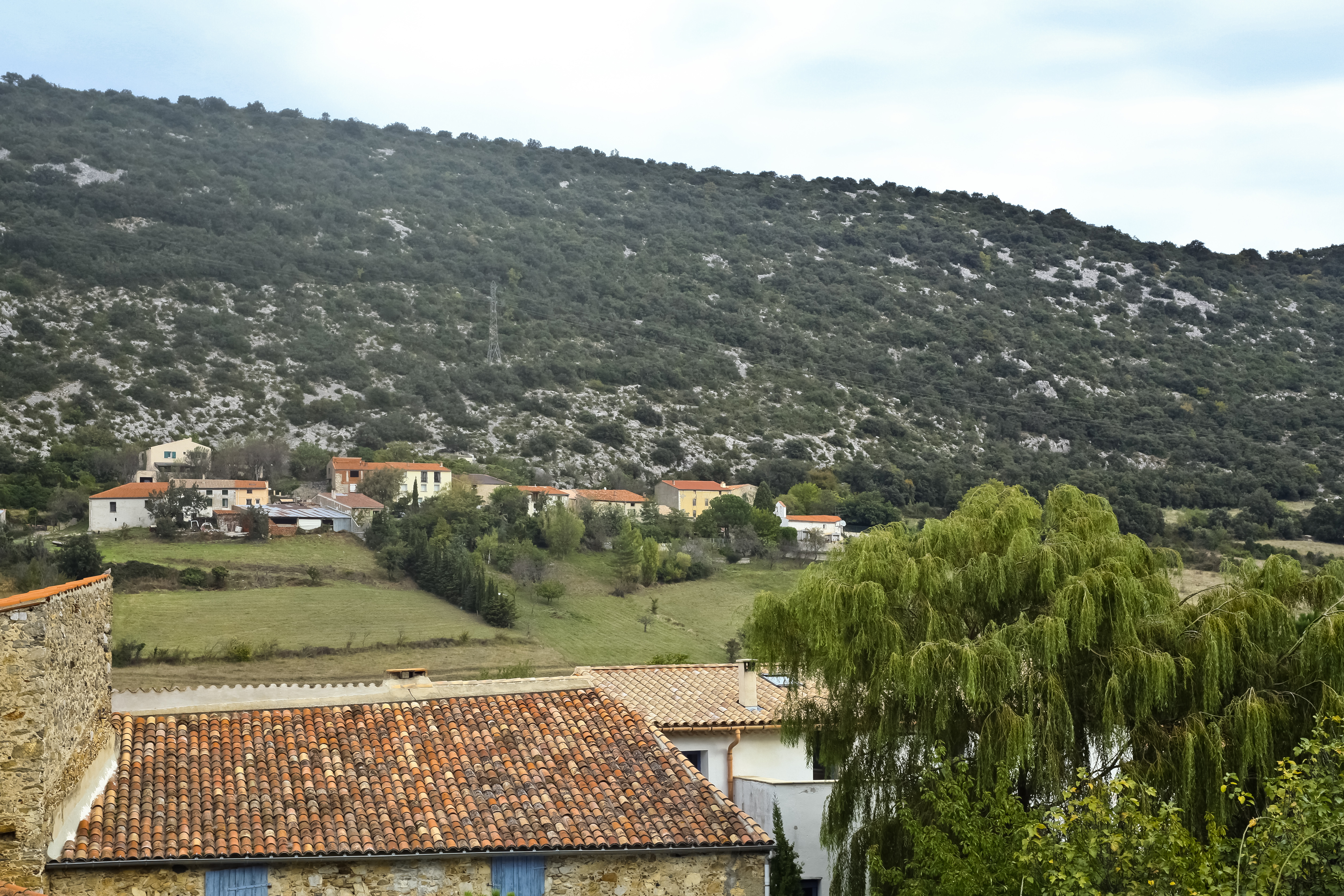 Le village de Fosse, Pyrénées-Orientales